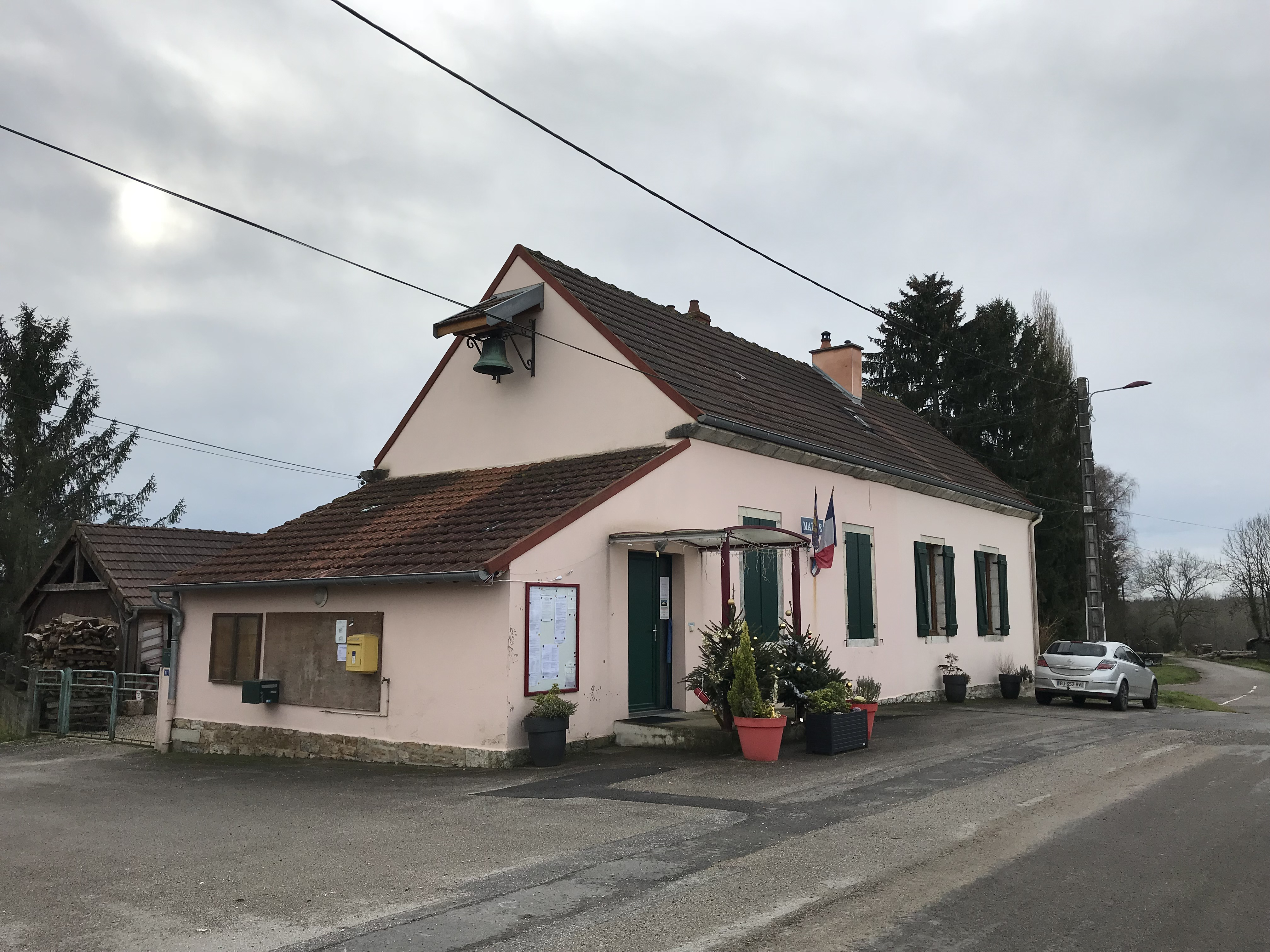 Sergenon (Jura, France) en janvier 2018.